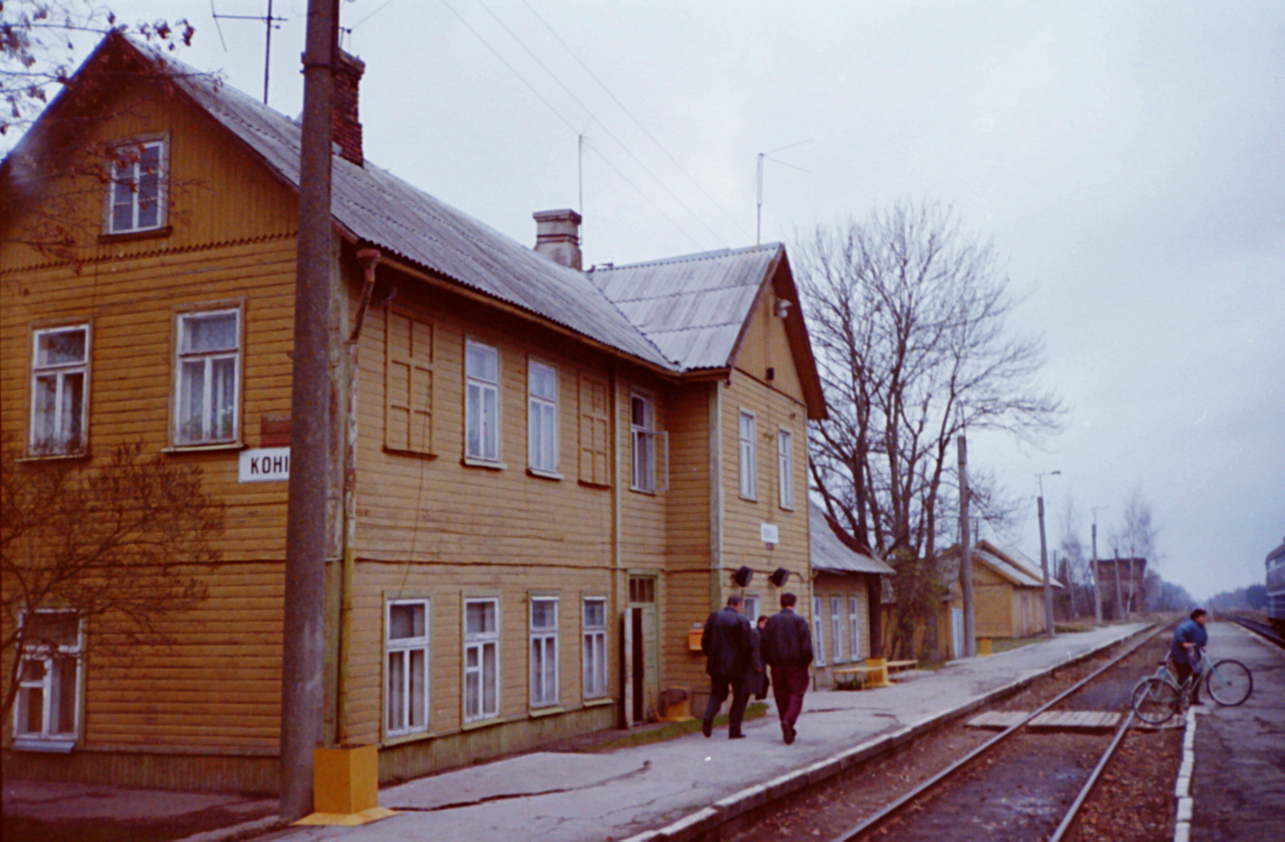 Kohila jaamahoone